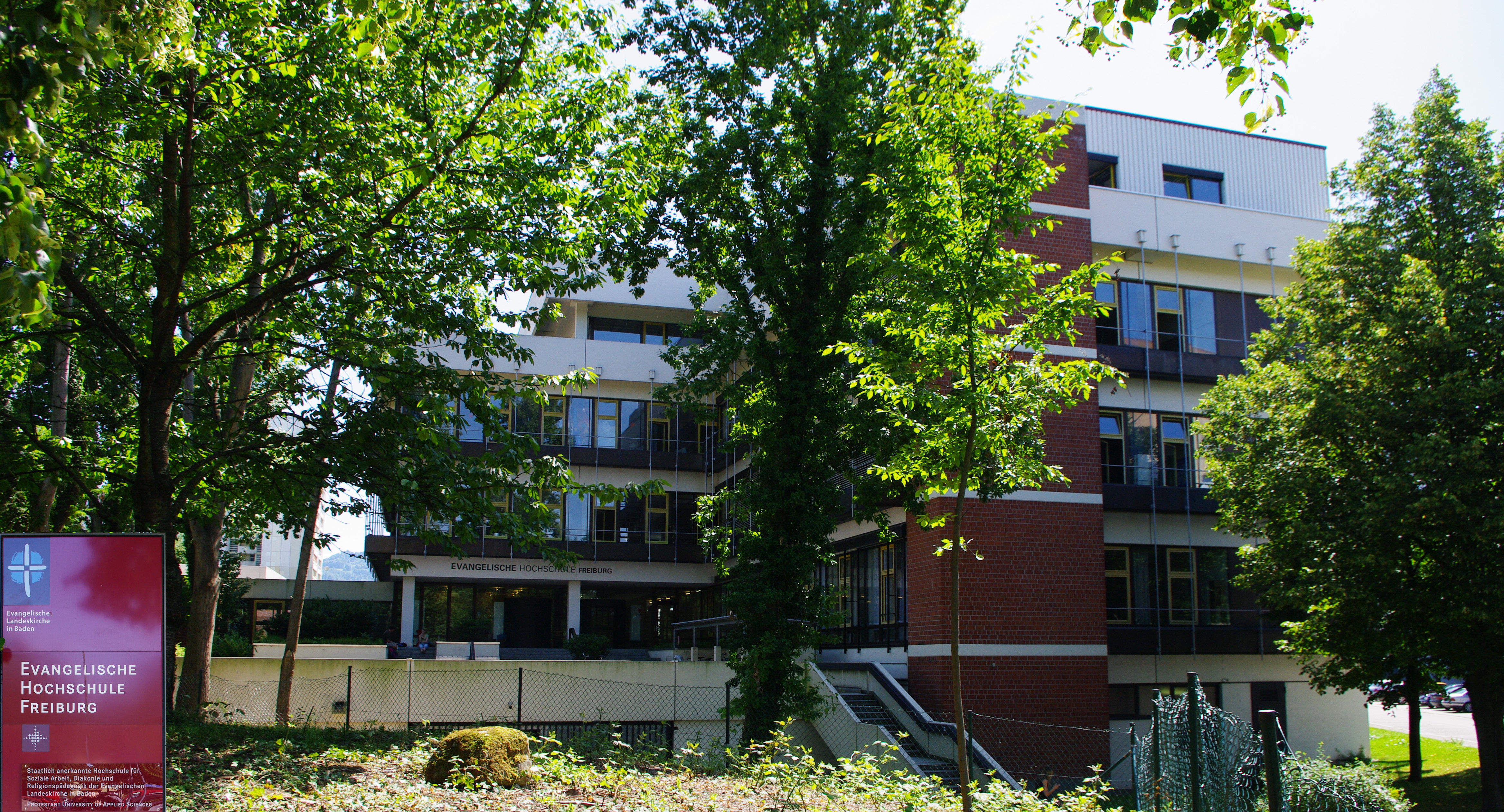 Die evangelische Hochschule in Freiburg